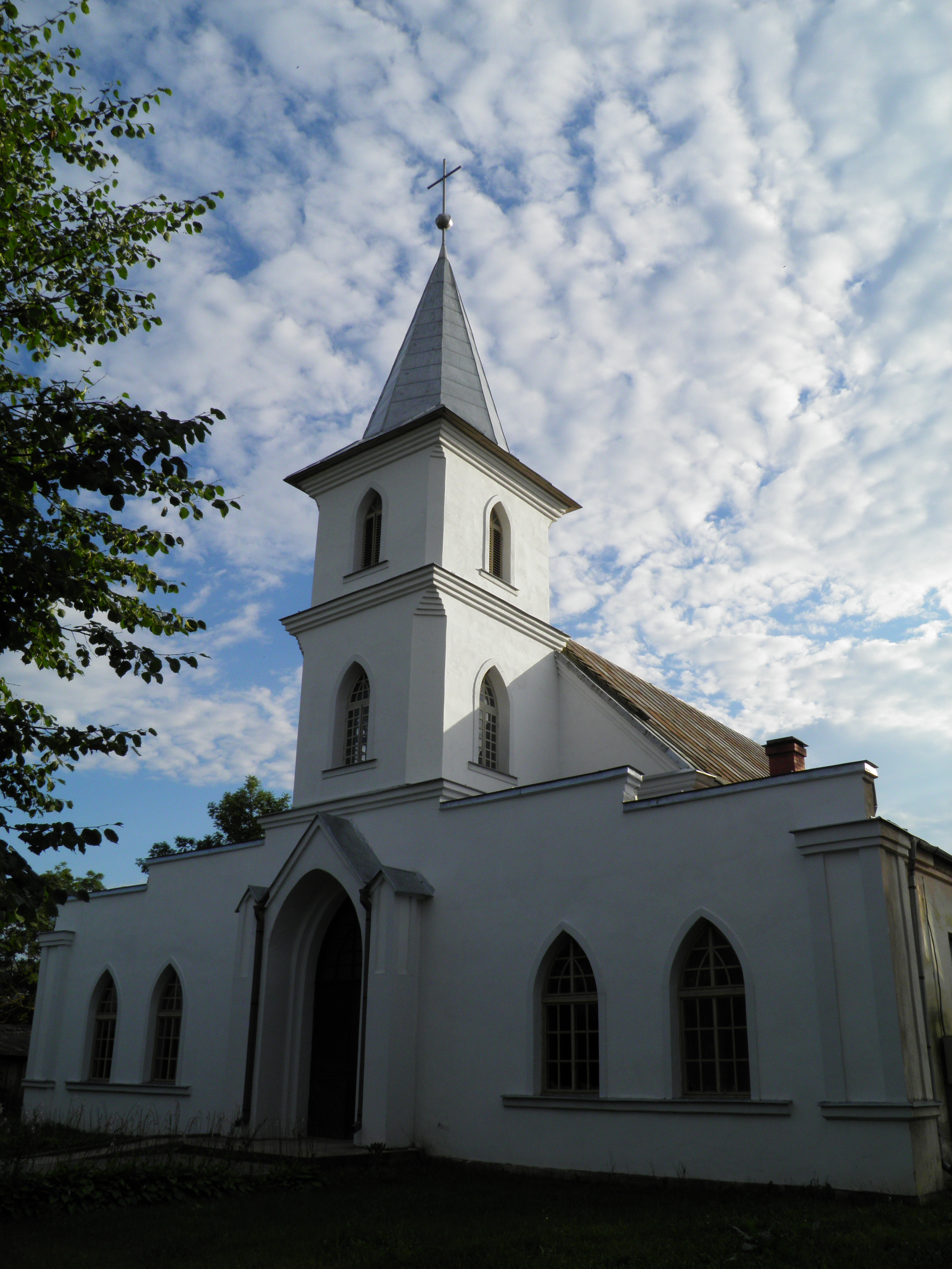 Iłukszta - kościół luterański.